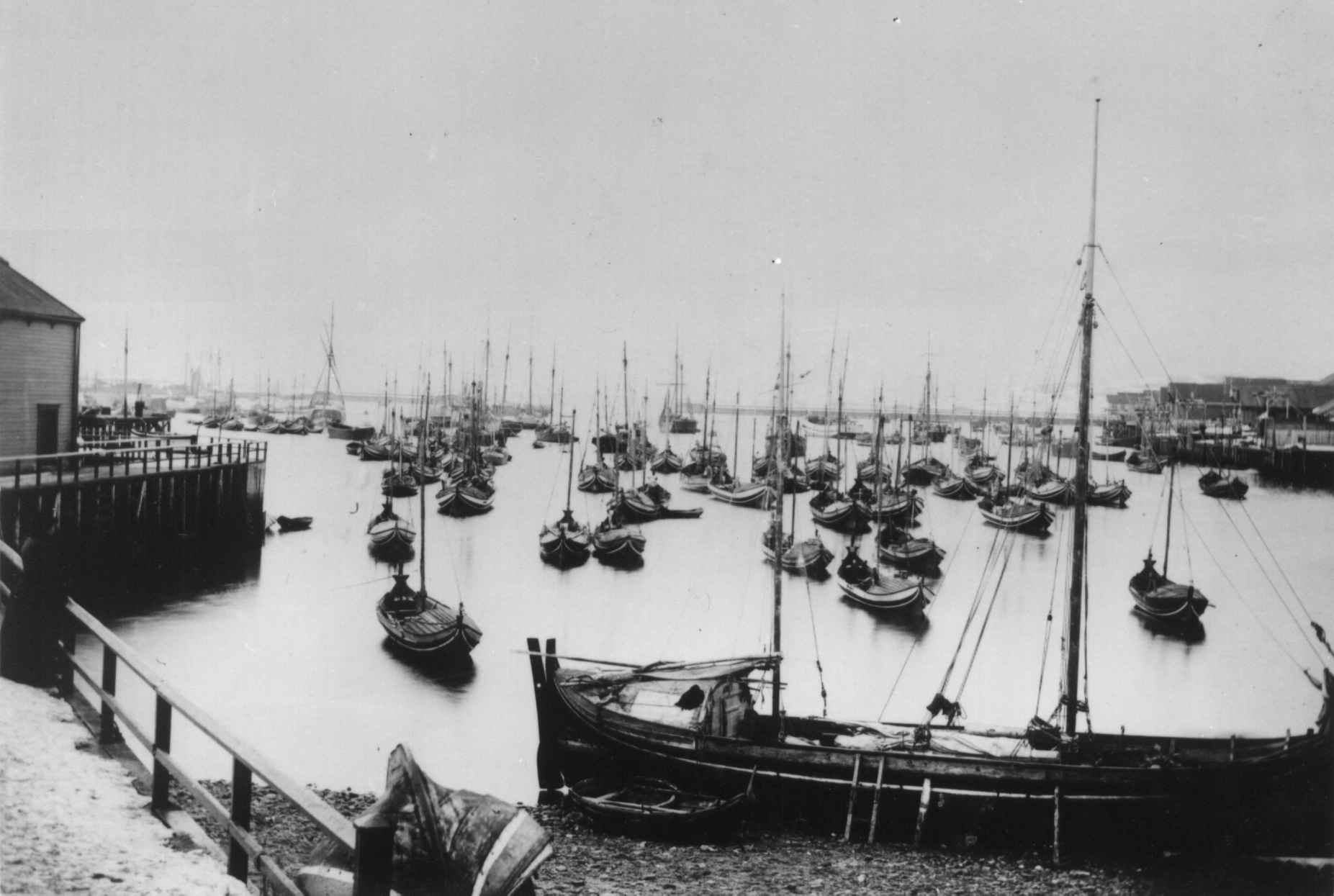 Vardø, Finnmark, ca. 1900. Havneparti med båter